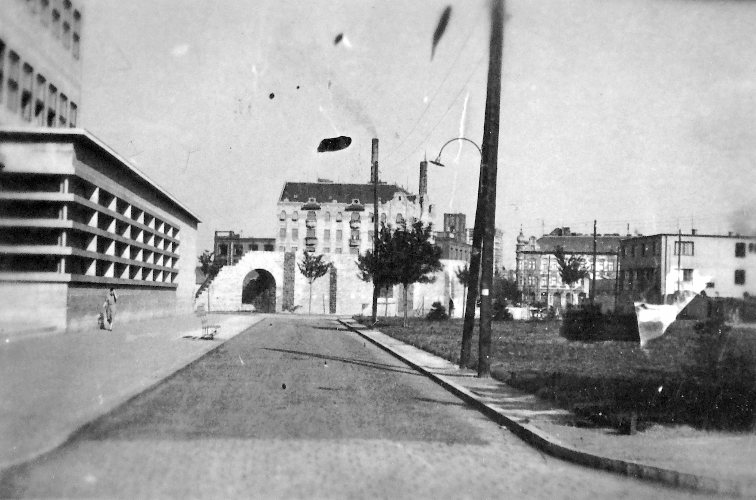 Árpád Gimnázium és a katonavárosi amfiteátrum. Location: Hungary, Budapest III., Óbuda Tags: Budapest Title: Árpád Gimnázium és a katonavárosi amfiteátrum.